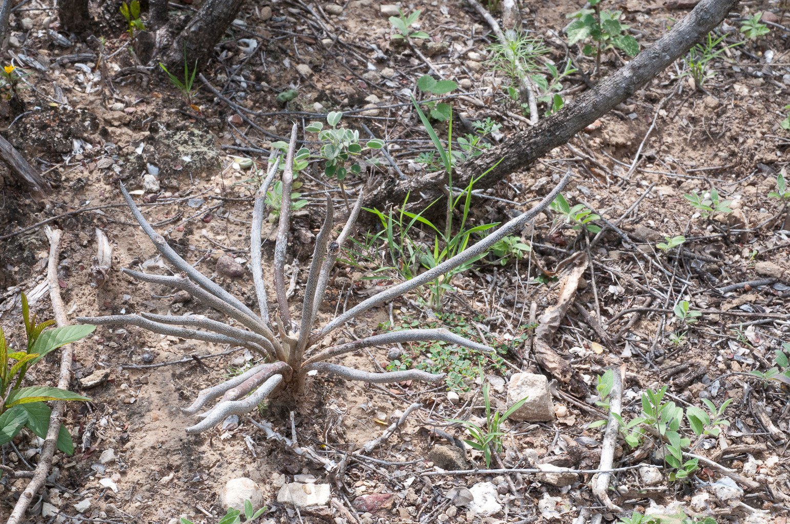 Digitostigma (Astrophytum) caput-medusae Ende 2002 erst beschrieben worden in Cactaceas y Suculentas Mexicanas